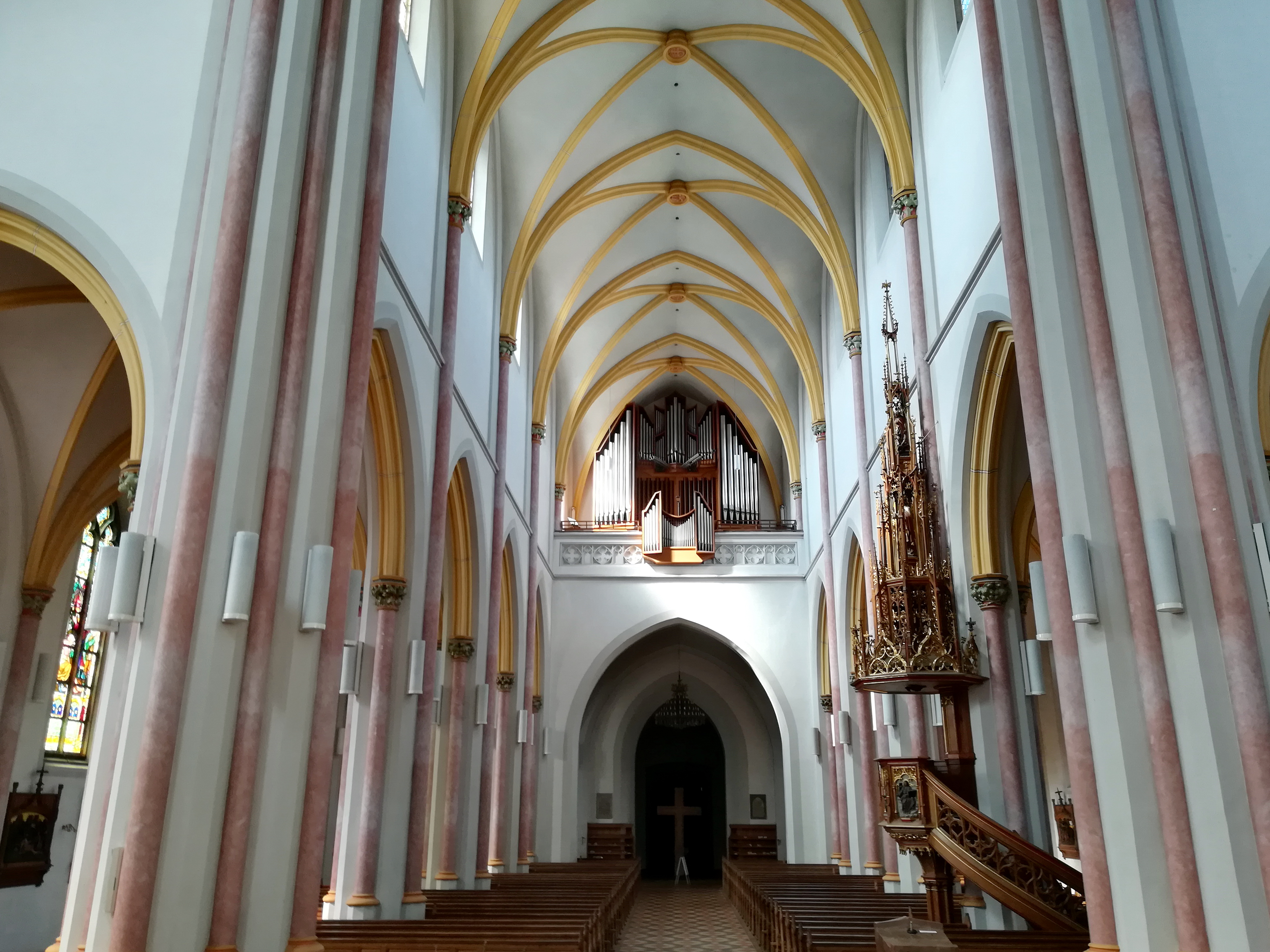 Die katholische Stadtpfarrkirche St. Nikolaus in Zwiesel ist ein neugotischer, aus Backstein errichteter dreischiffiger Kirchenbau mit einem Querschiff und Turm.